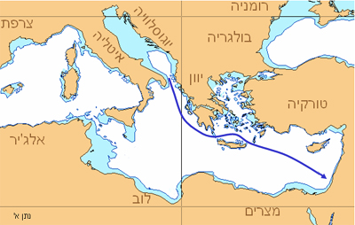 אוניית המעפילים נתן - מסלול